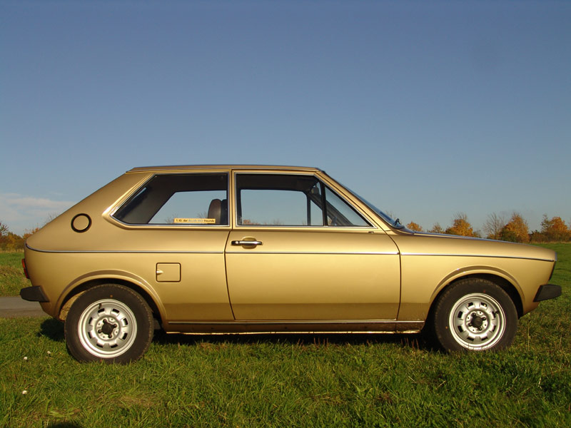 Audi 50 GL Vorführfahrzeug aus der 1. Septemberwoche 1974